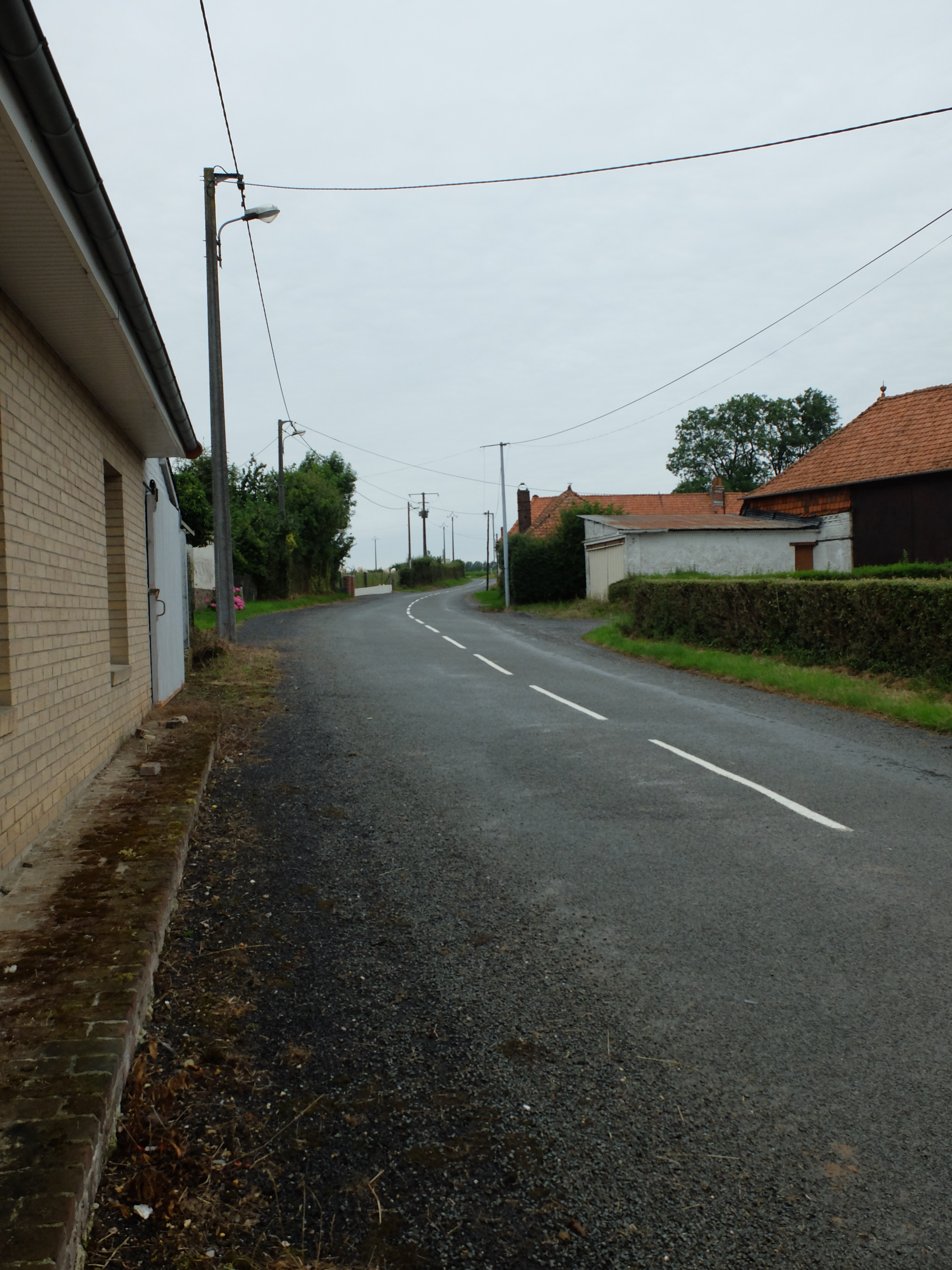 Vue de Guinecourt.